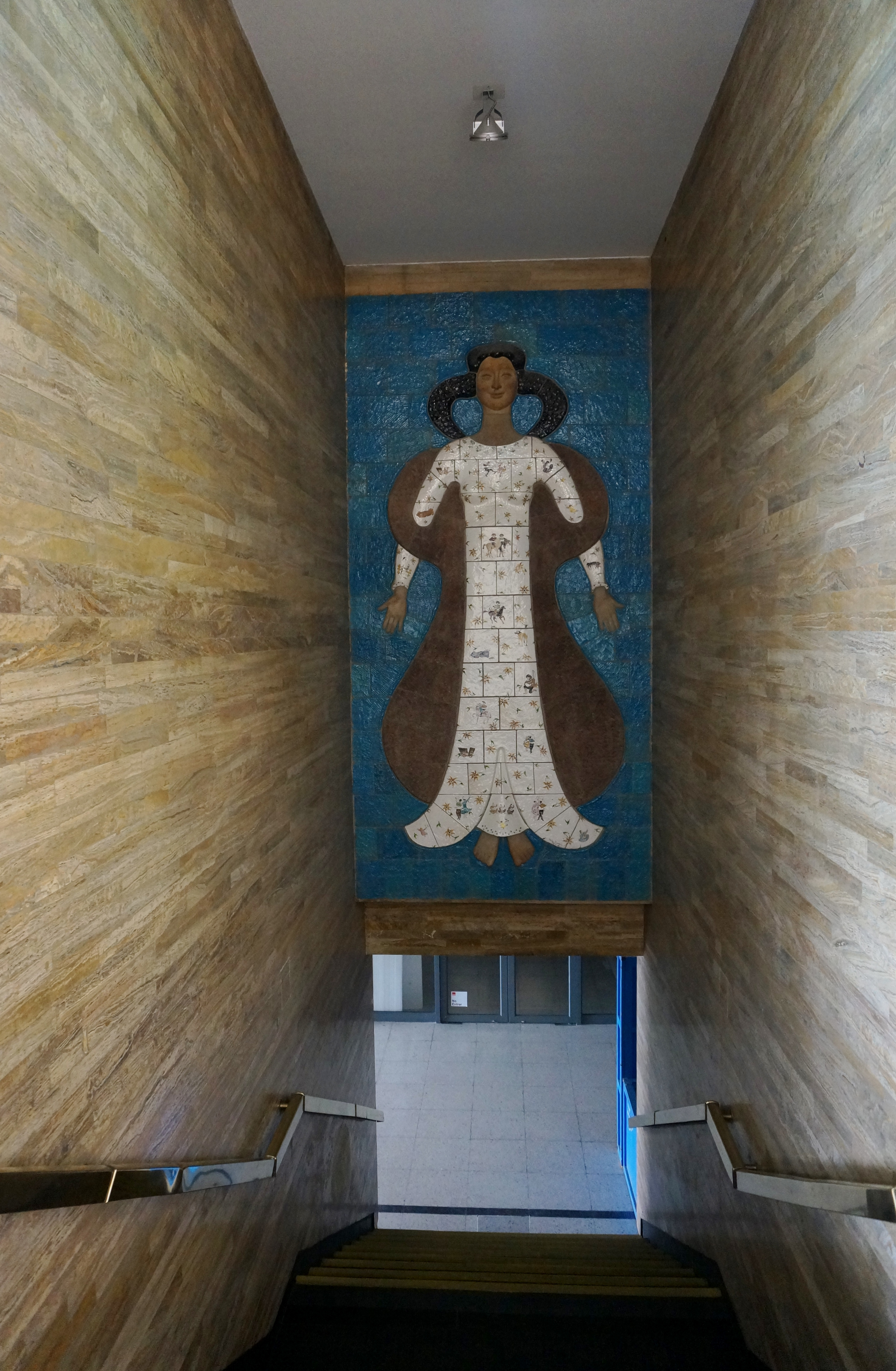 Mural en cerámica de Héctor Román en las escaleras que bajan al subterráneo del aeropuerto Los Cerrillos, hoy Centro Nacional de Arte Contemporáneo Cerrillos.